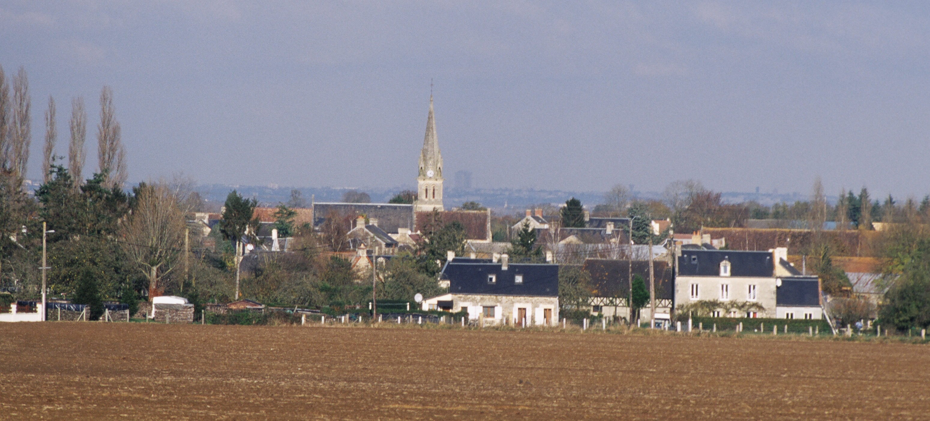 Village of Saint Laurent-de-Condel, in Calvados (14), in France.